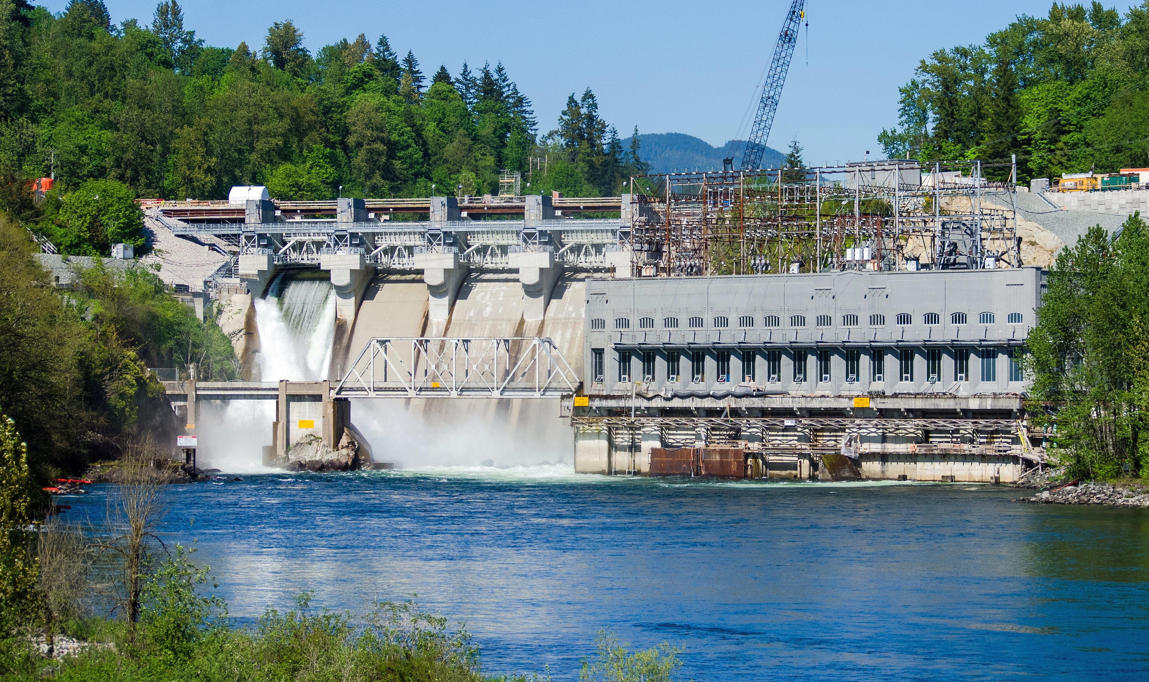 Seen in Smallville, The X-Files, MacGyver, & Dark Angel.